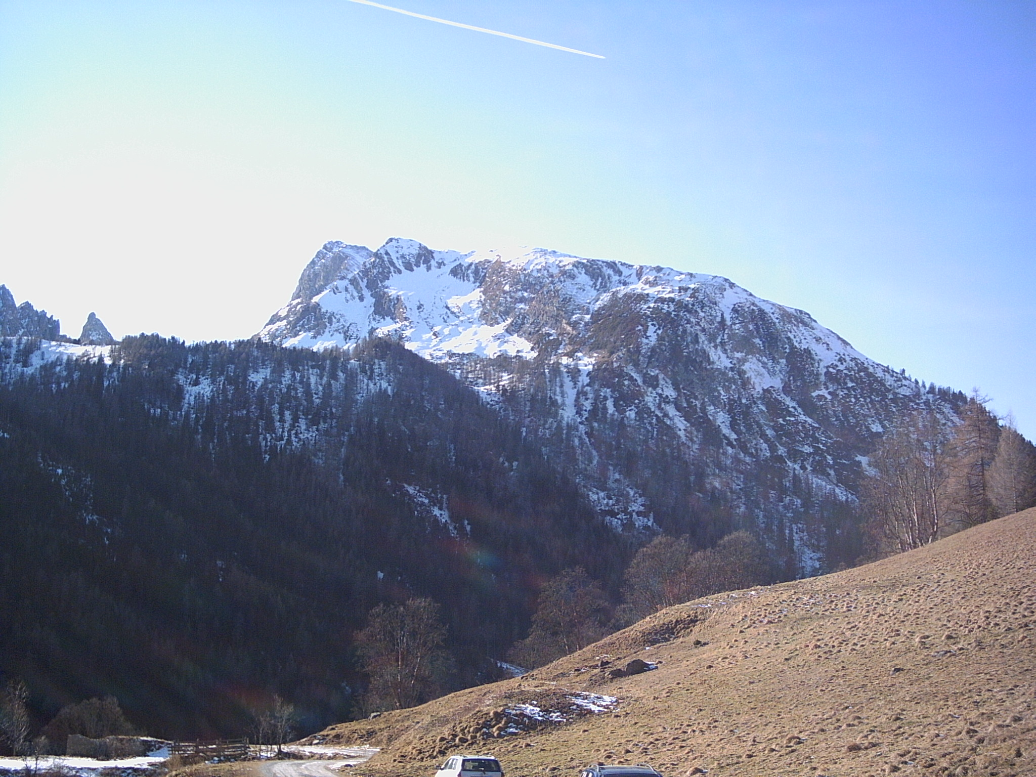 Weißeck von Zederhaus in Richtung Westen fotografiert